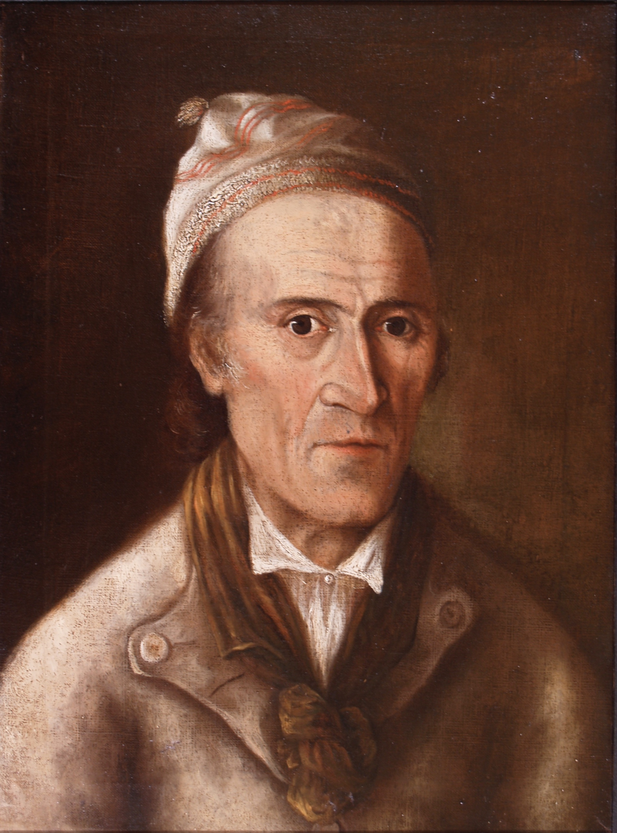 Ulrich_Bräker_Gemälde_Toggenburger_Museum